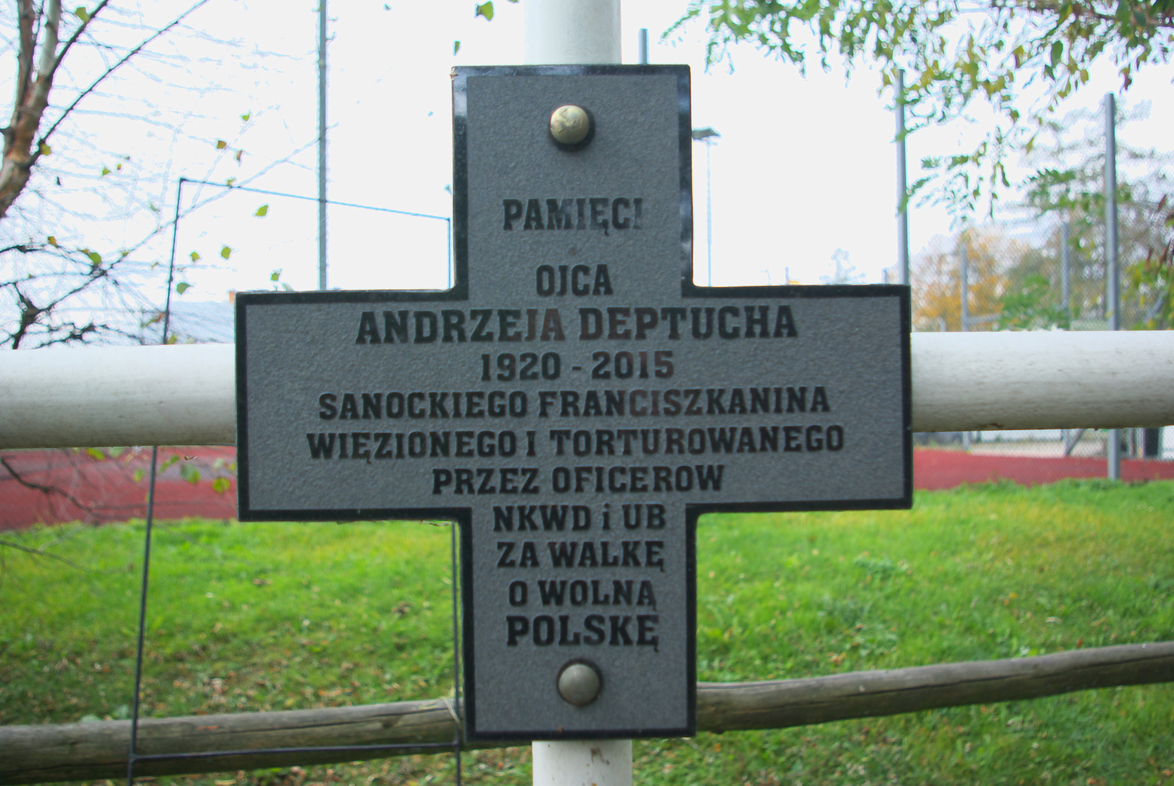 Tabliczka na krzyżu honorującym o. Andrzeja Deptucha w Parku Kwitnąca Akacja w Trepczy.